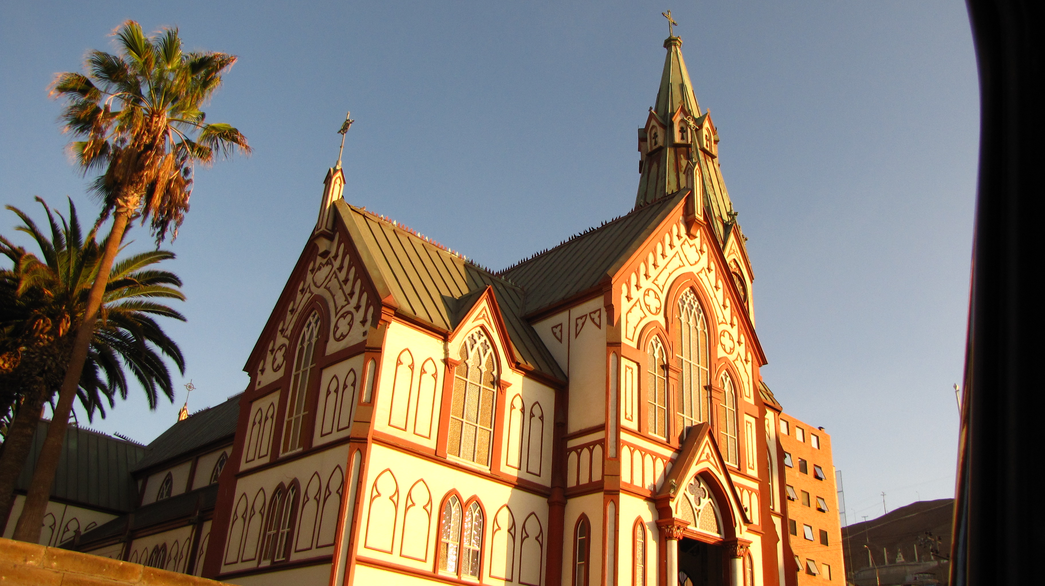 Catedral de San Marcos: Hermosa construcción y sus imágenes bellísimas. This is a photo of a national monument in Chile: 522